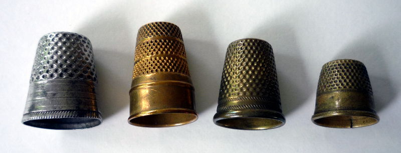 Fingerhüte in verschiedenen Ausführungen mit den üblichen runden "Grübchen" (Deutschland ca. 1. Hälfte des 20. Jhd.)